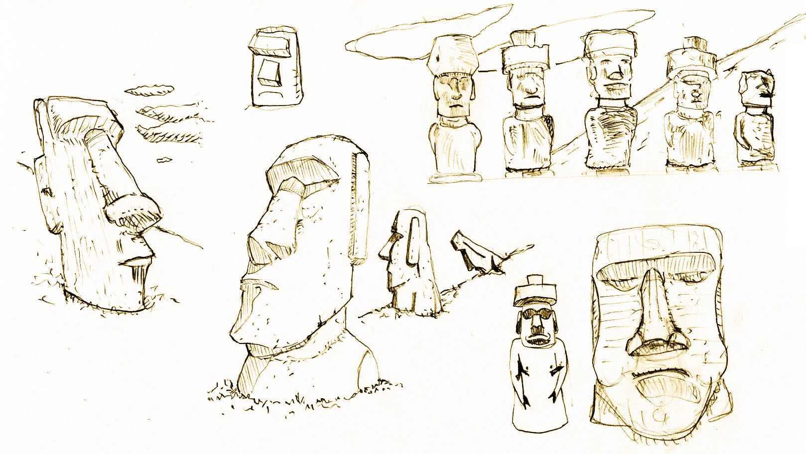 moais sketchs